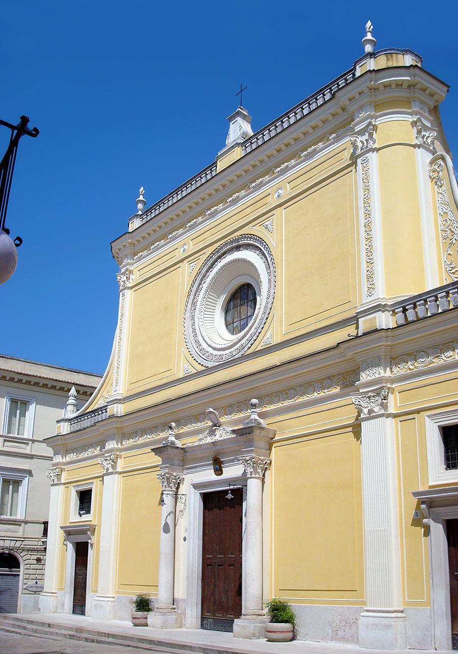 Facciata della Cattedrale di San Severo. Categoria:San Severo